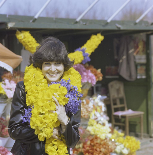 De Zwitserse zangeres Paola del Medico tijdens een fotosessie voor het Eurovisie Songfestival 1980